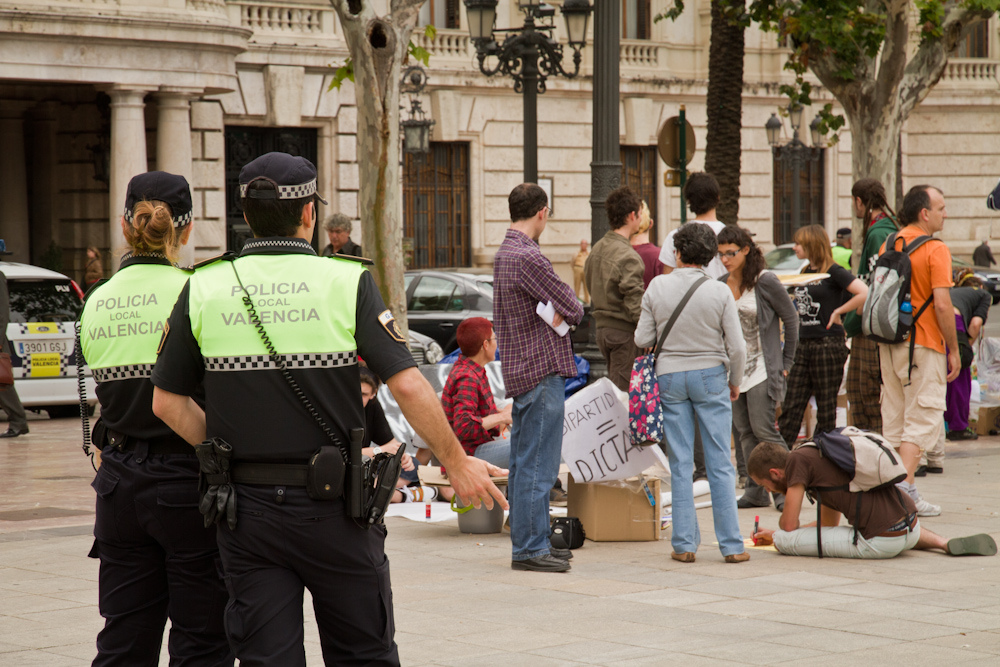 Policias municipales de Valencia observan el transcurso de actividades del movimiento 15M. Si quieres más información acerca de esta imagen y los derechos de la misma, por favor, contacta con el autor. Consulta las licencias "Creative Commons" para saber más. Cualquier uso de esta fotografía debe incluir de forma legible los siguientes datos del autor: ©Adolfo Senabre - .es